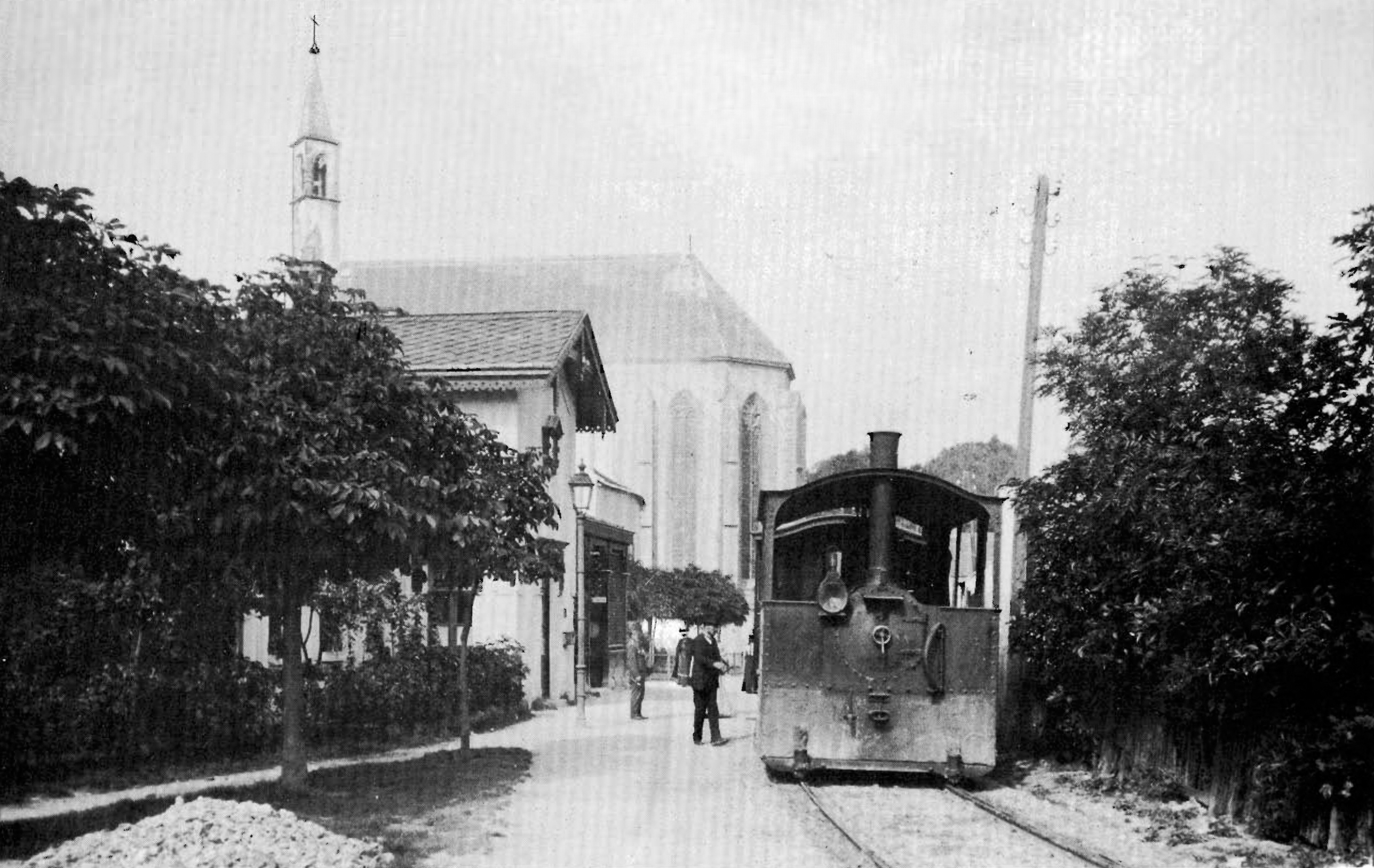 Dampftramway in der Station Wienergasse (Bild vor 1921)